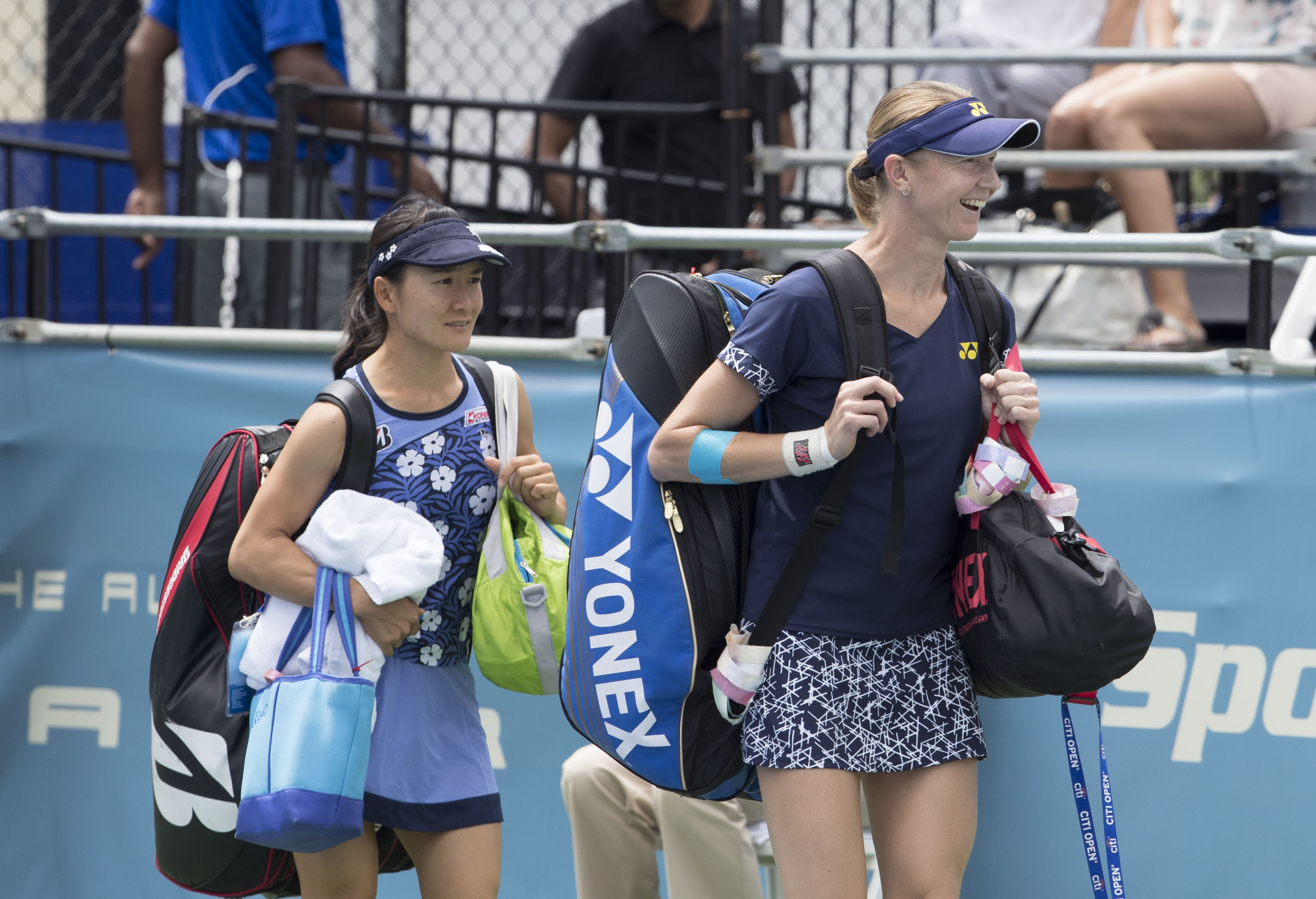 Citi Open Tennis 2017